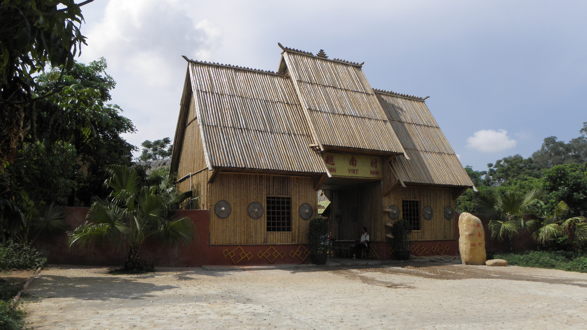 越南村